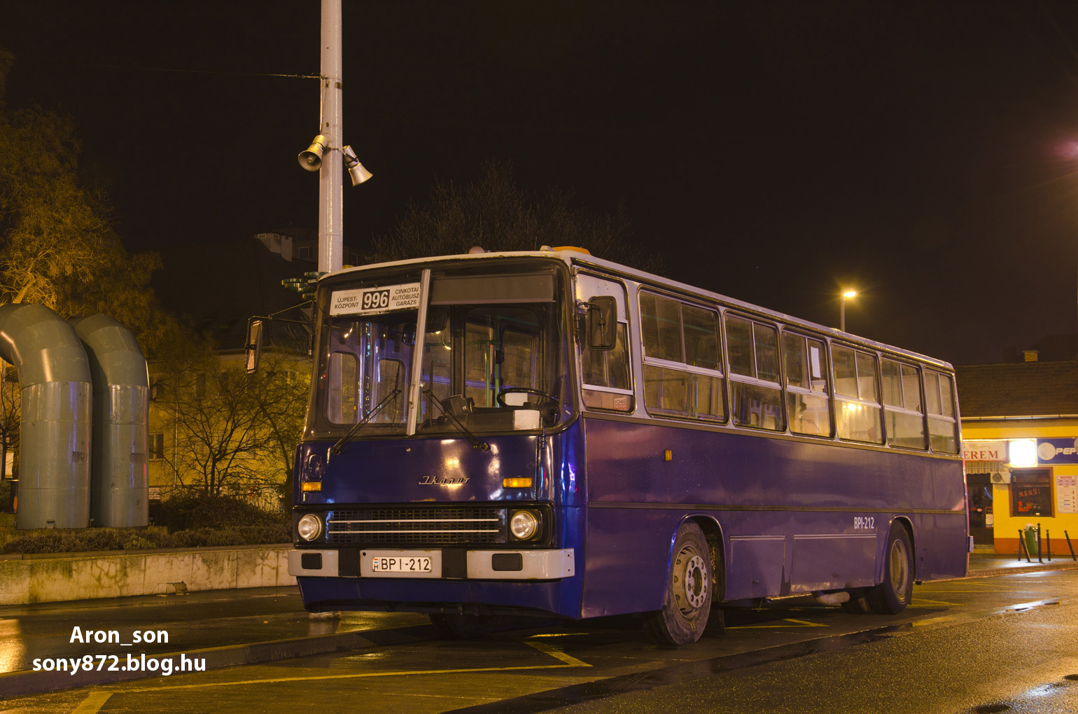 996-os jelzésű Ikarus 260-as busz Újpest-Központban (frsz. BPI-212)